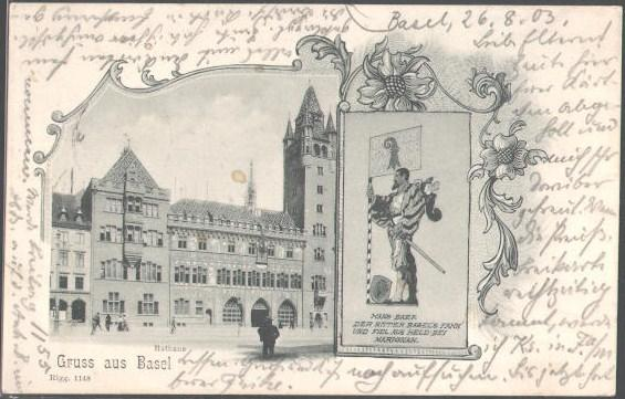 Ansichtskarte Basel: Rathaus und Darstellung von Hans Bär mit Basler Fahne (der auch am Basler Rathaus abgebildet ist), gelaufen 26. August 1903 von Basel nach Berlin-Friedenau (Wegner)